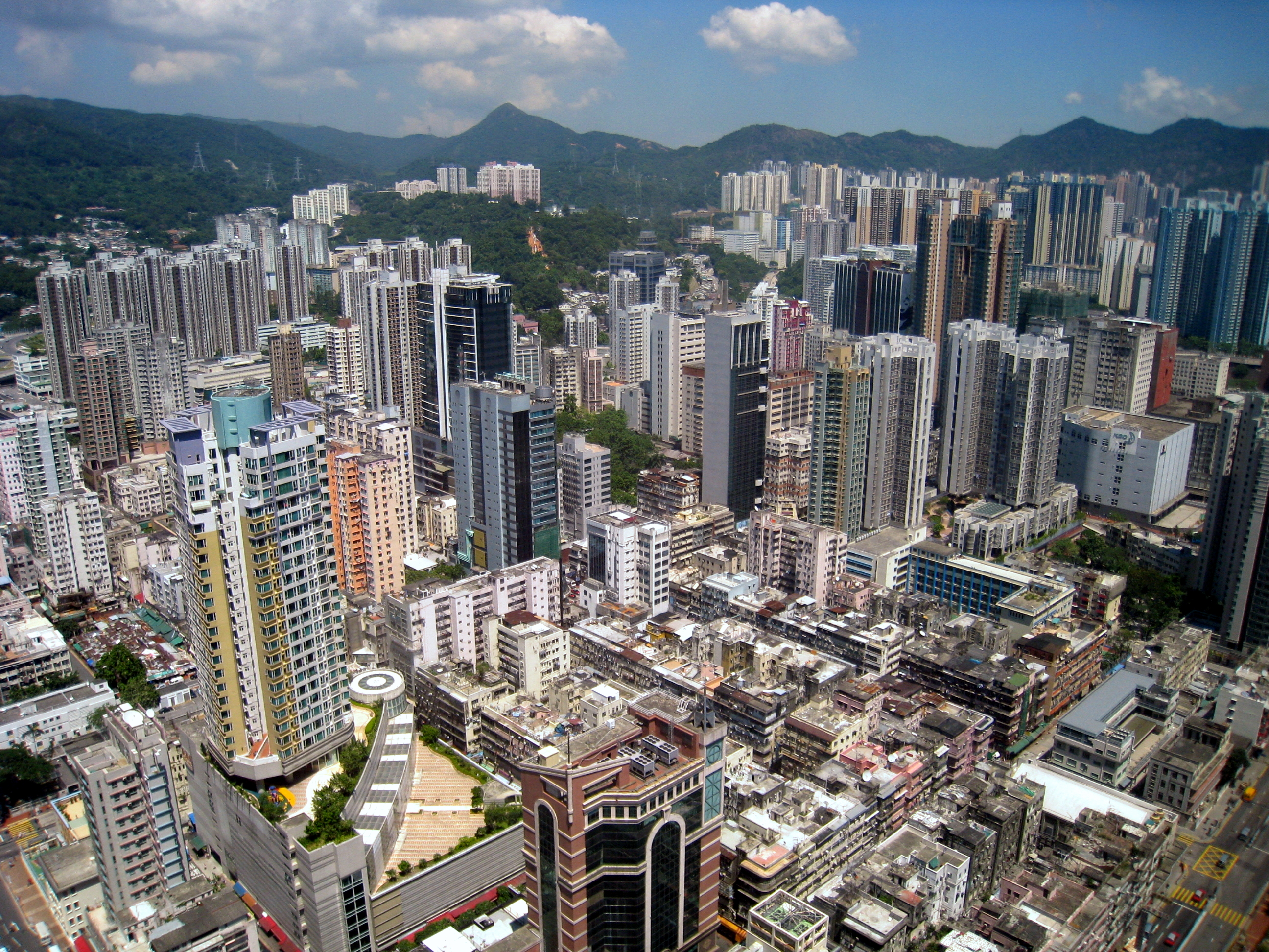 Tsuen Wan Overview in 2008